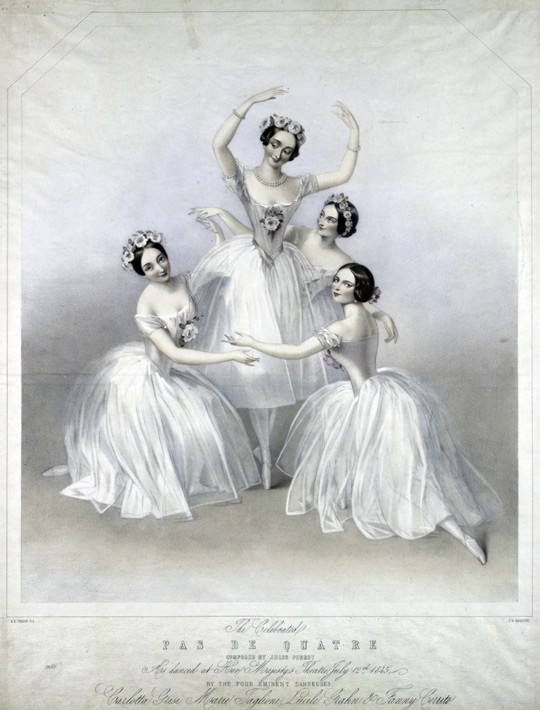 "Pas de Quatre" divertissement - Lithograph